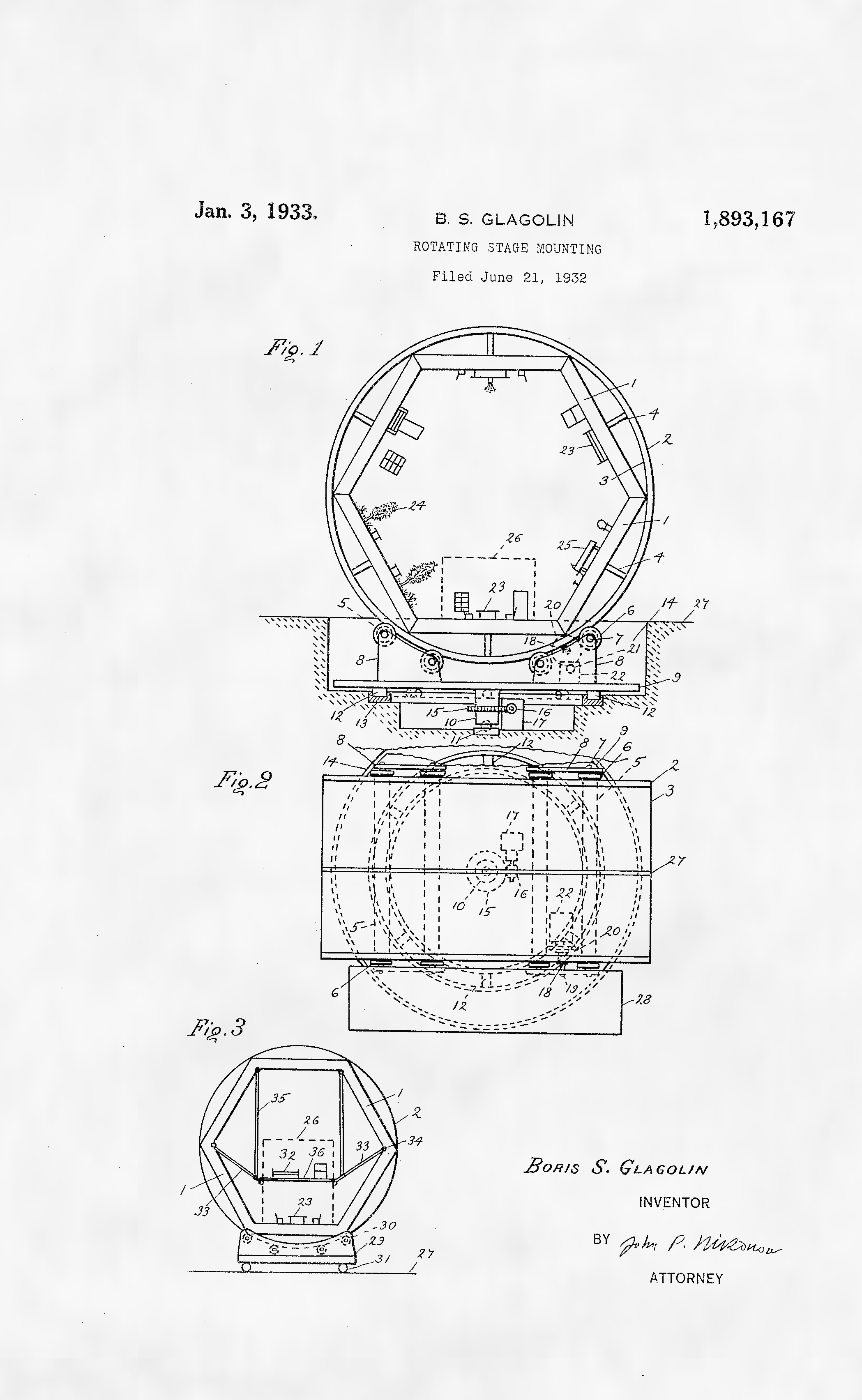 схема из американского патента №1.893.167 Бориса Глаголина "Вращающаяся сценическая установка" (Rotating Stage Mounting — US Patent №1.863.167)